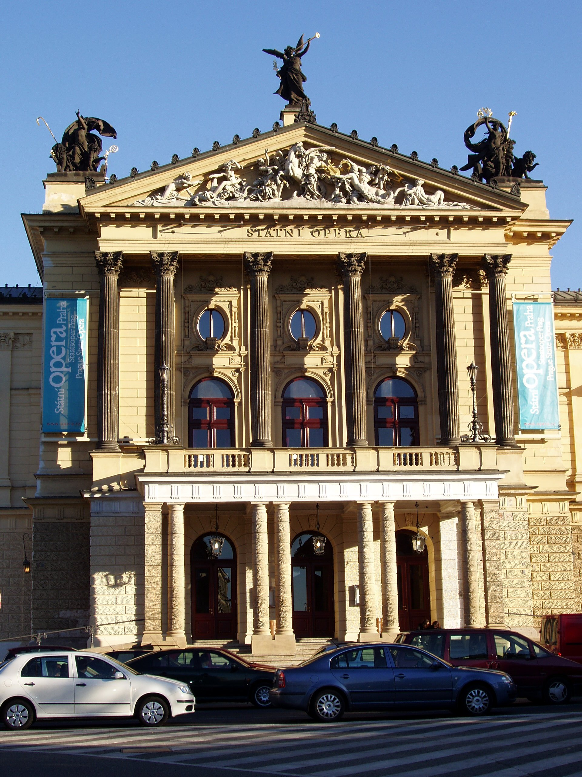 Státní opera